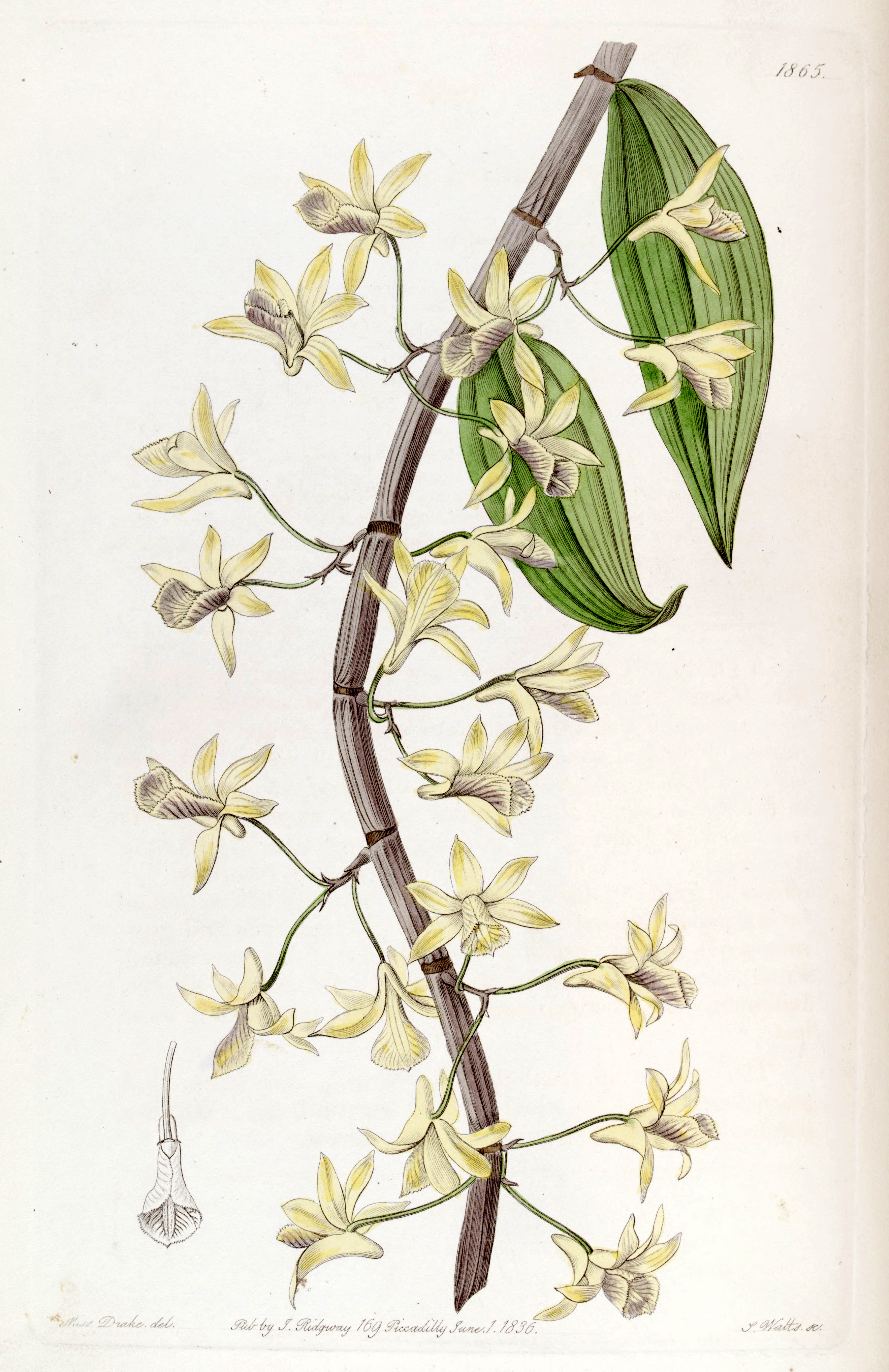 Dendrobium aphyllum (as syn. Dendrobium macrostachyum)